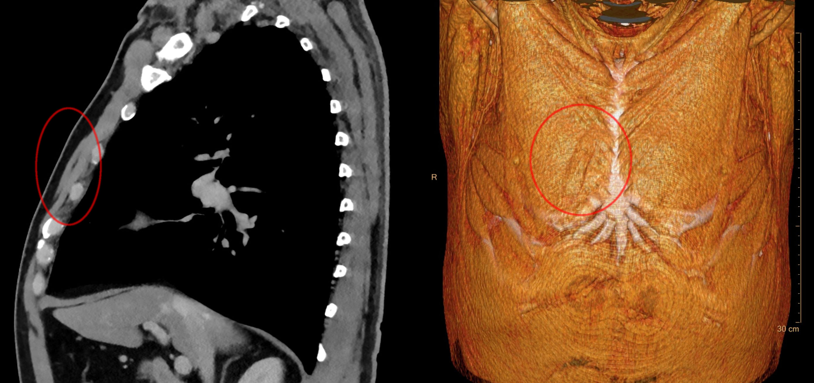 Musculus sternalis als anatomische Variante rechts neben dem Sternum vor dem M. pectoralis major. Computertomographie links sagittal und rechts in Volumen rendering - Rekonstruktion. Der Muskel kann gerade in axialen Bildern als Pathologie fehlinterpretiert werden.